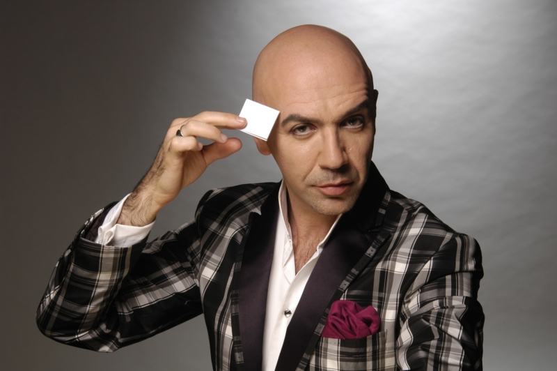 Mago Norberto Jansenson